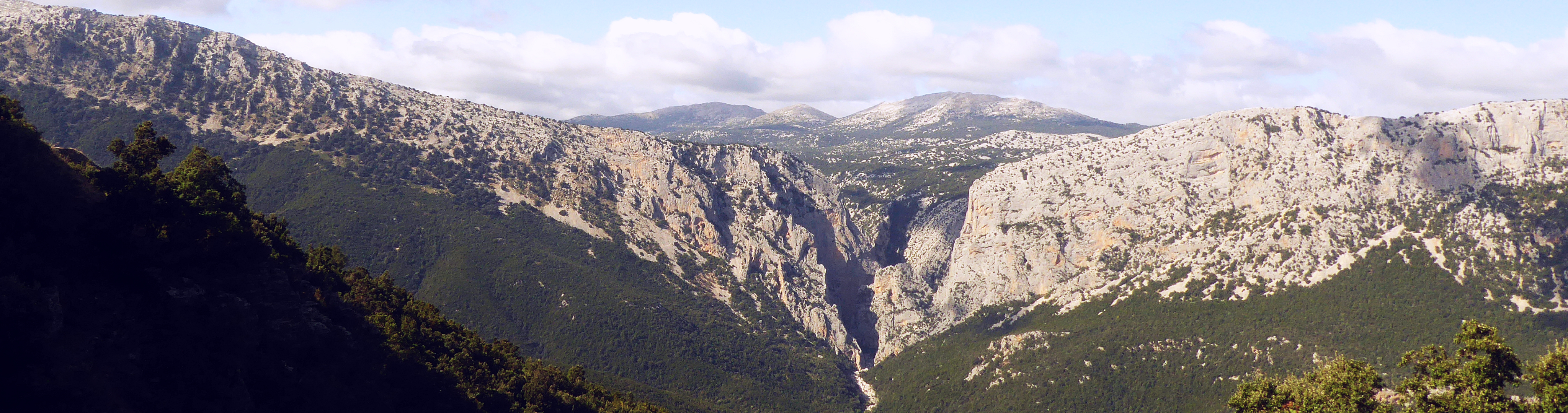 Gola di Gorropu, eine der mächtigsten Schluchten in Europa bis 500 m tief in der Provinz Nuoro nahe den Ortschaften Urzulei (südl) und Orgosolou (westl) auf der Insel Sardinien, Italien. Foto Wolfgang Pehlemann P1350077